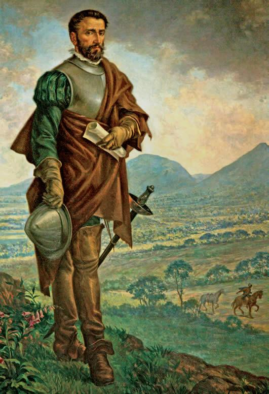 Retrato de don Gonzalo Jiménez de Quesada ubicada en el Palacio Liévano. Salón Gonzalo Jiménez de Quesada.